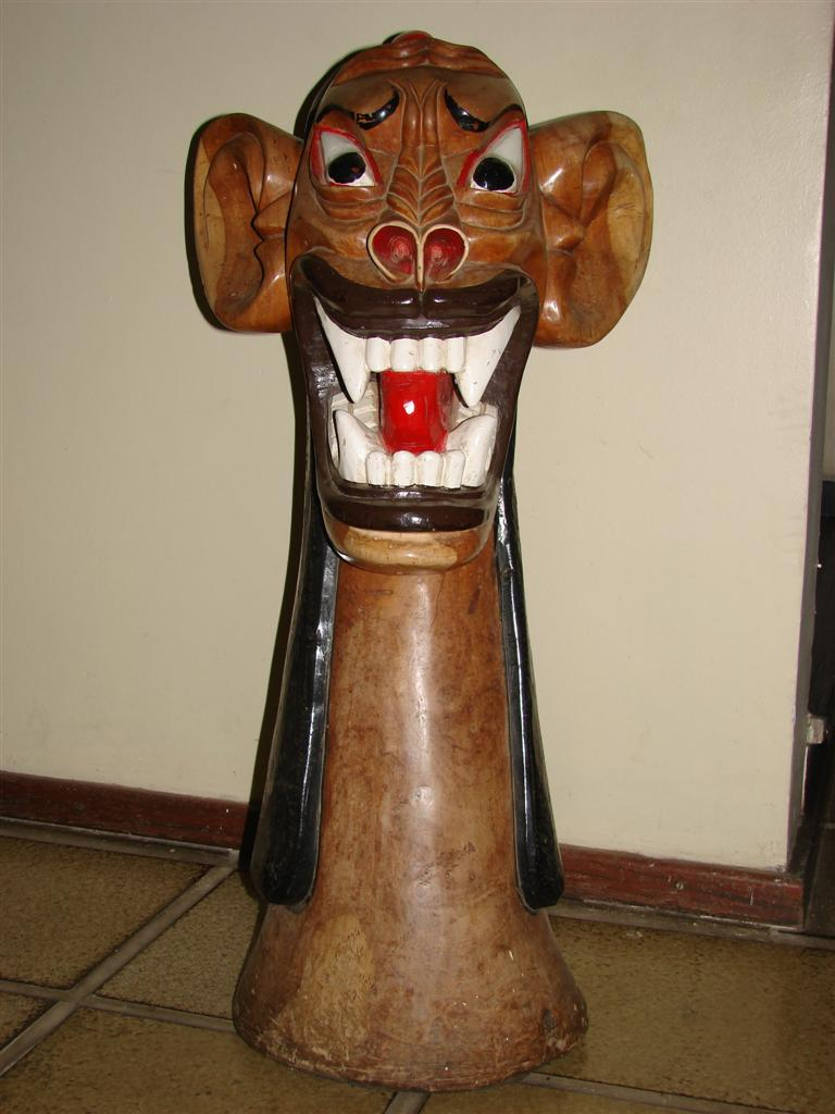 Carranca - protetora do SF